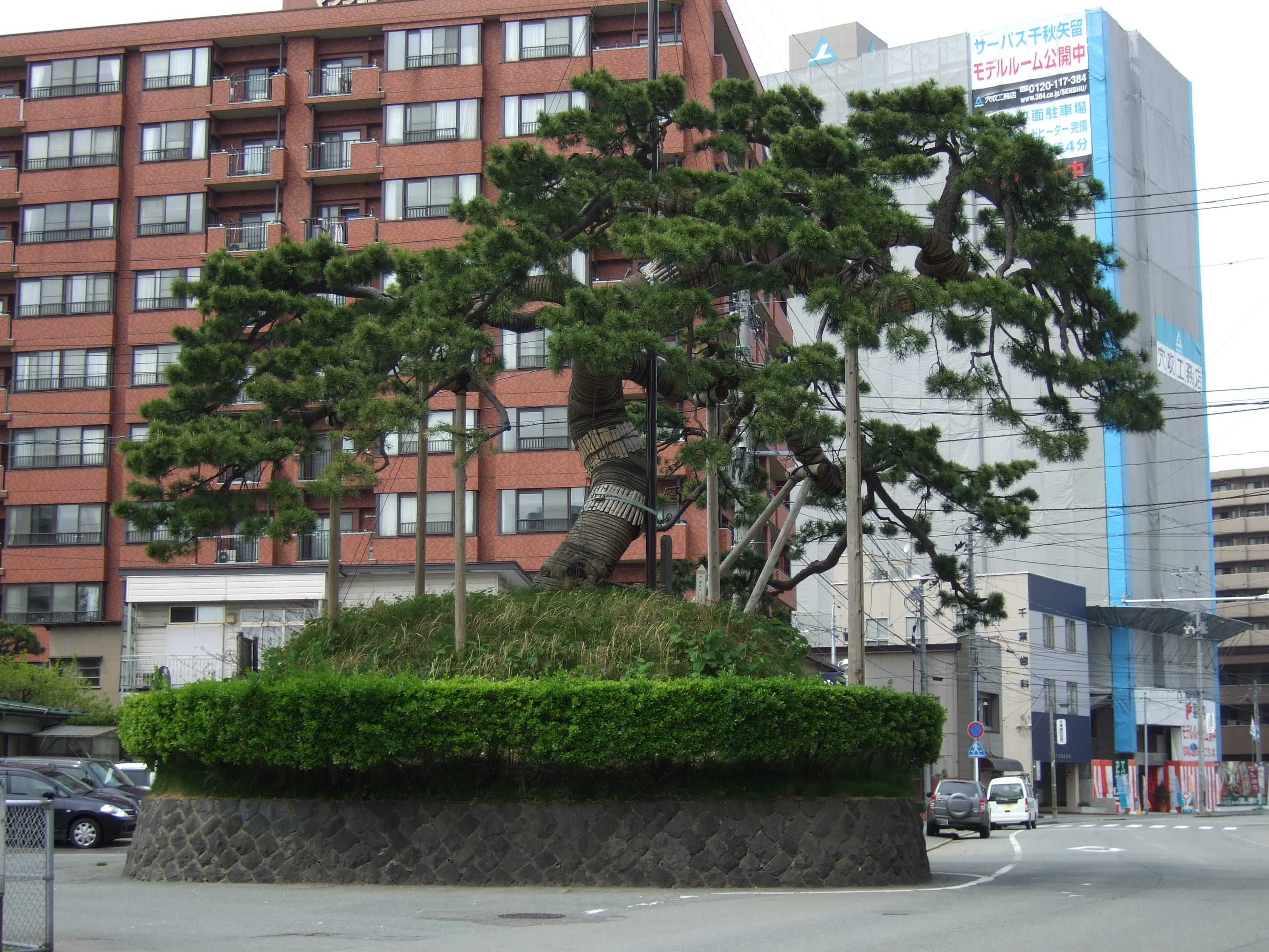 秋田市千秋矢留町の旭川土手跡に聳える「鷹の松」(Taka-no-matu, Hawk's pine, in Akita-city, Japan)